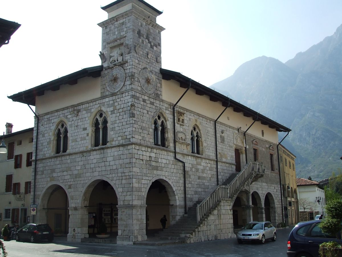 Sebi1, Venzone - Il palazzo del Municipio